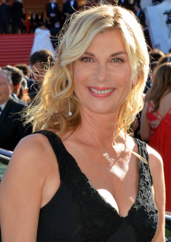 Michèle Laroque au festival de Cannes